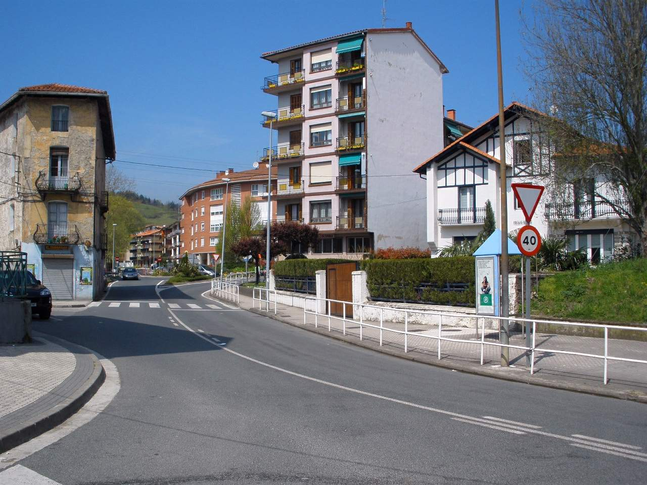 Barrio de Elbarrena de Zizurkil (Guipúzcoa)